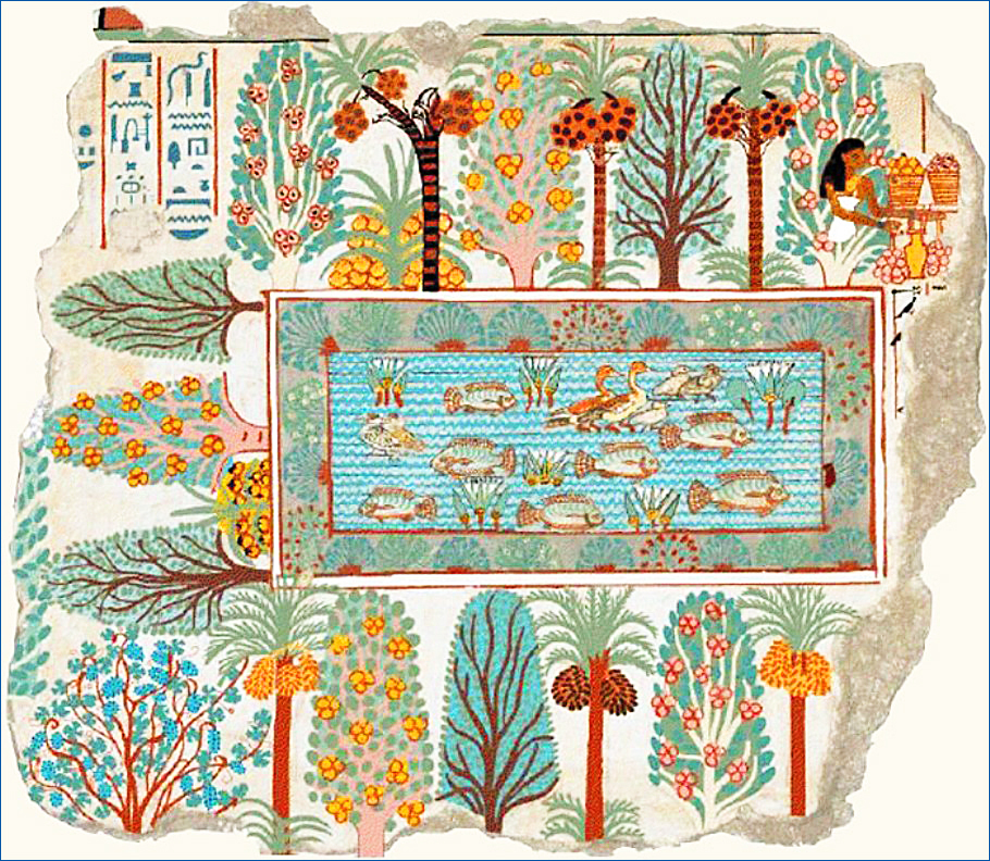 Le jardin et la piscine de Nebamon. Egypte 1350 av. J.-C